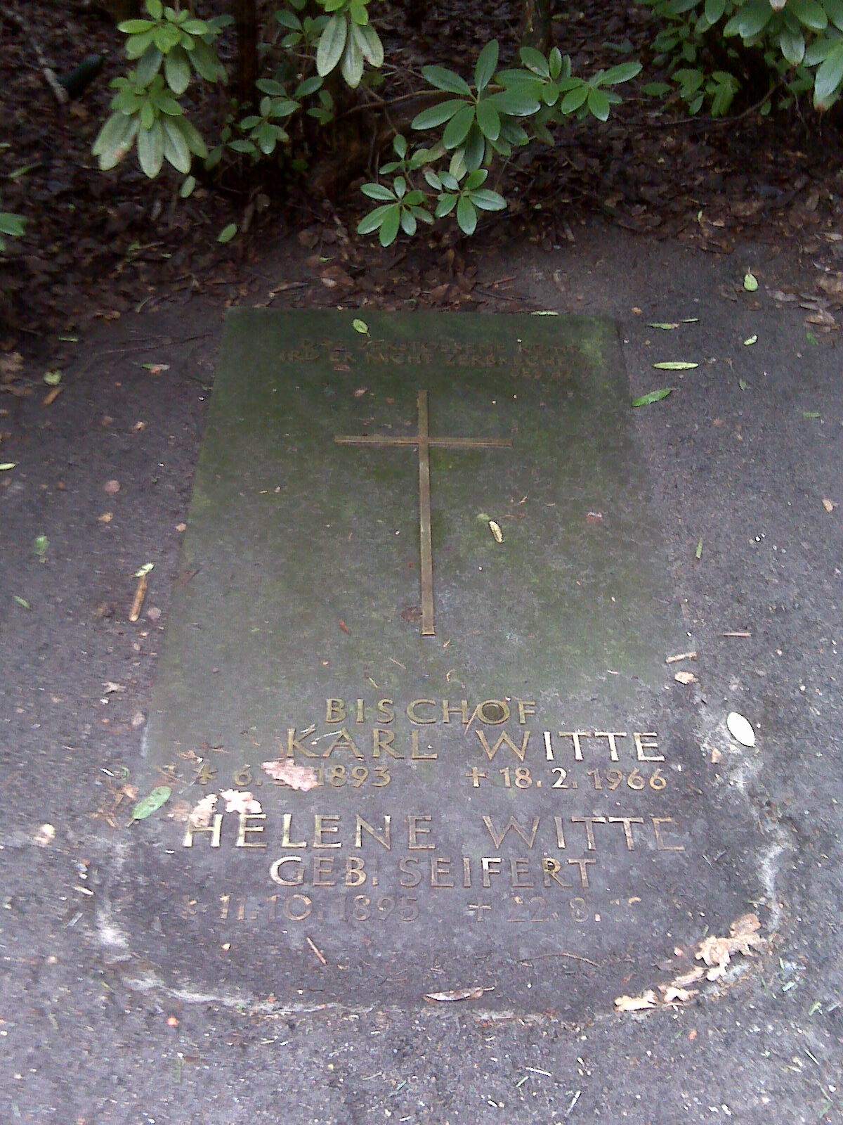 Grabplatte des Hamburger Bischofs